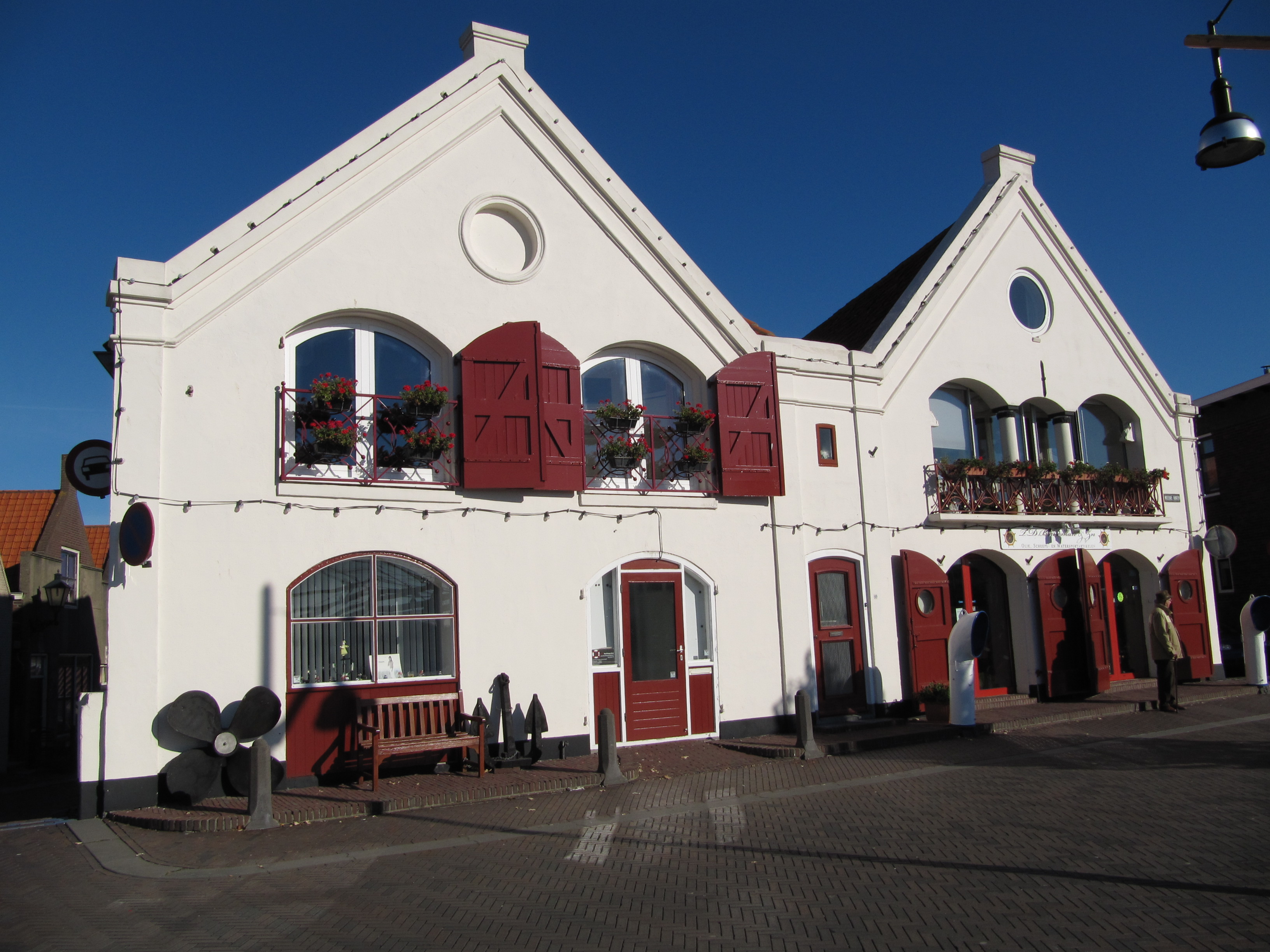 Zierikzee - Nieuwe Haven (twee pakhuizen).jpg